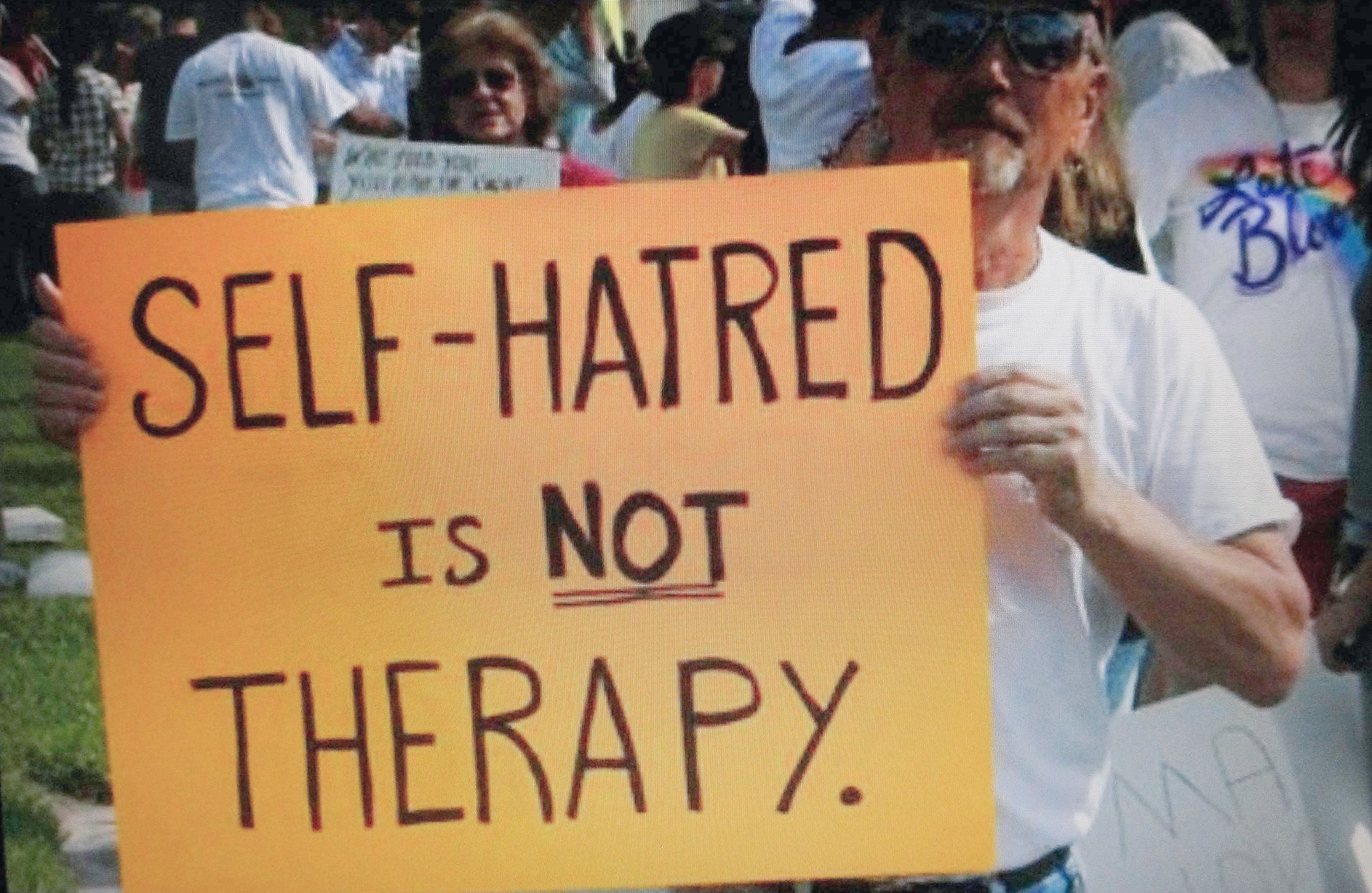 Guy holding a sign.